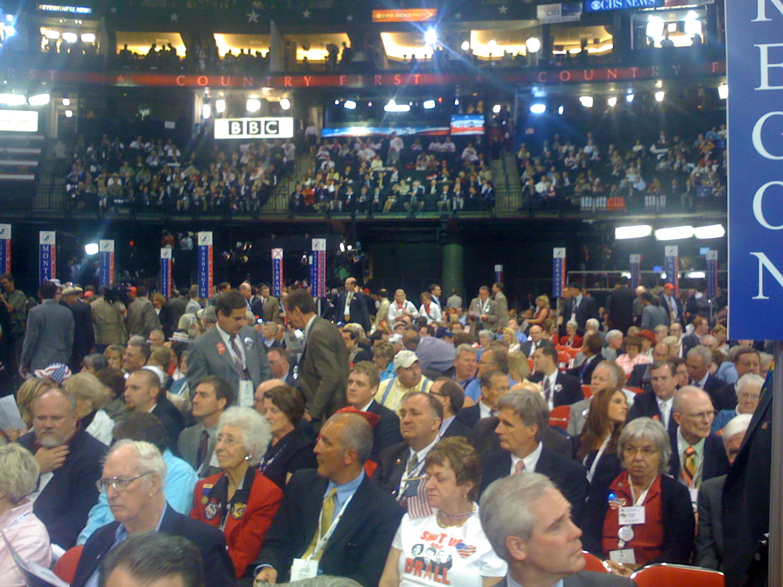 RNC Oregon delegation